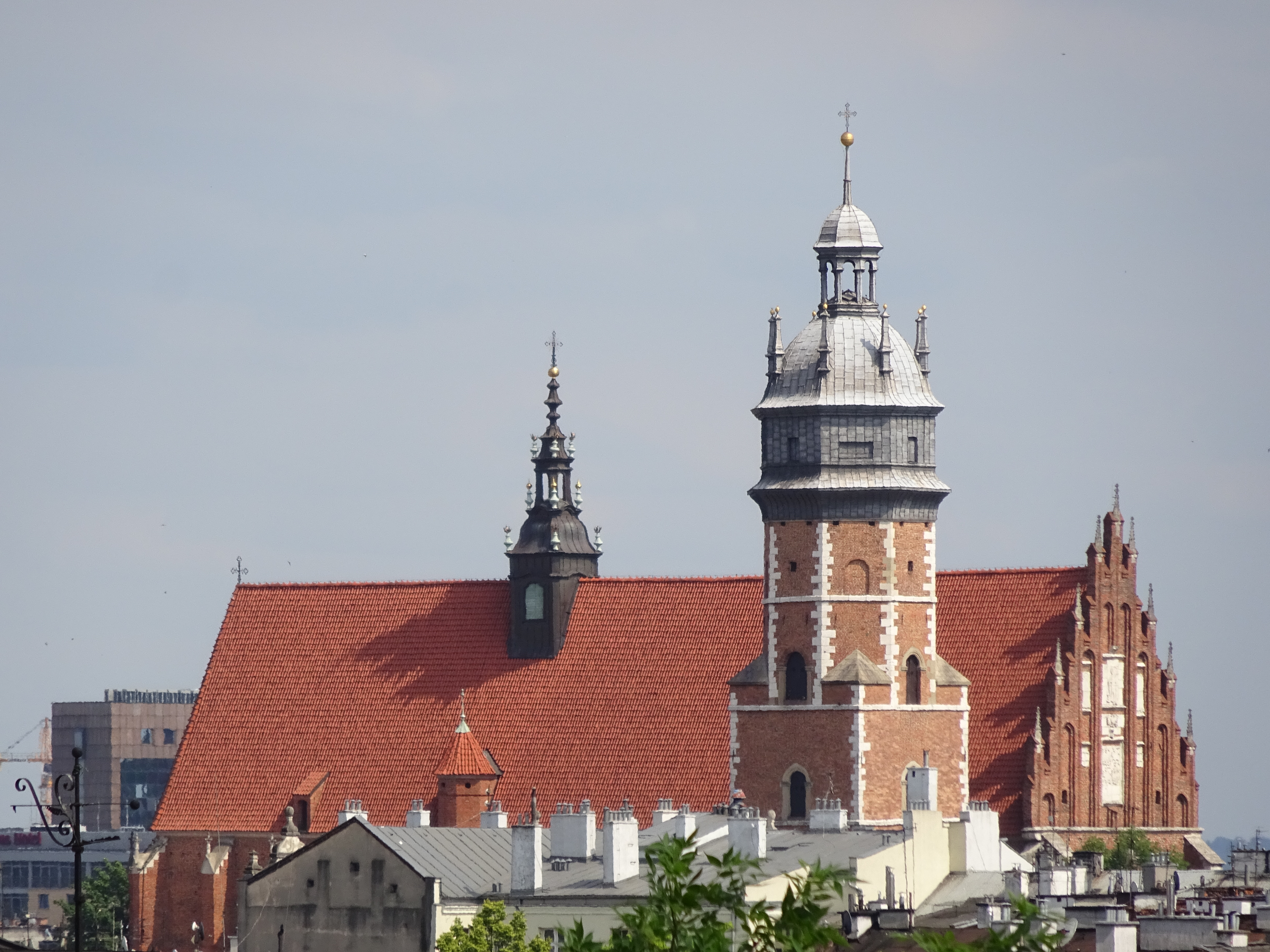 Kościół Bożego Ciała w Krakowie na Kazimierzu. Widok z Wawelu. 2016